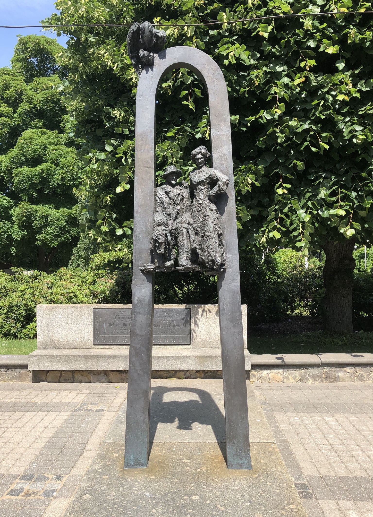 Rainis-Denkmal Riga-Strand